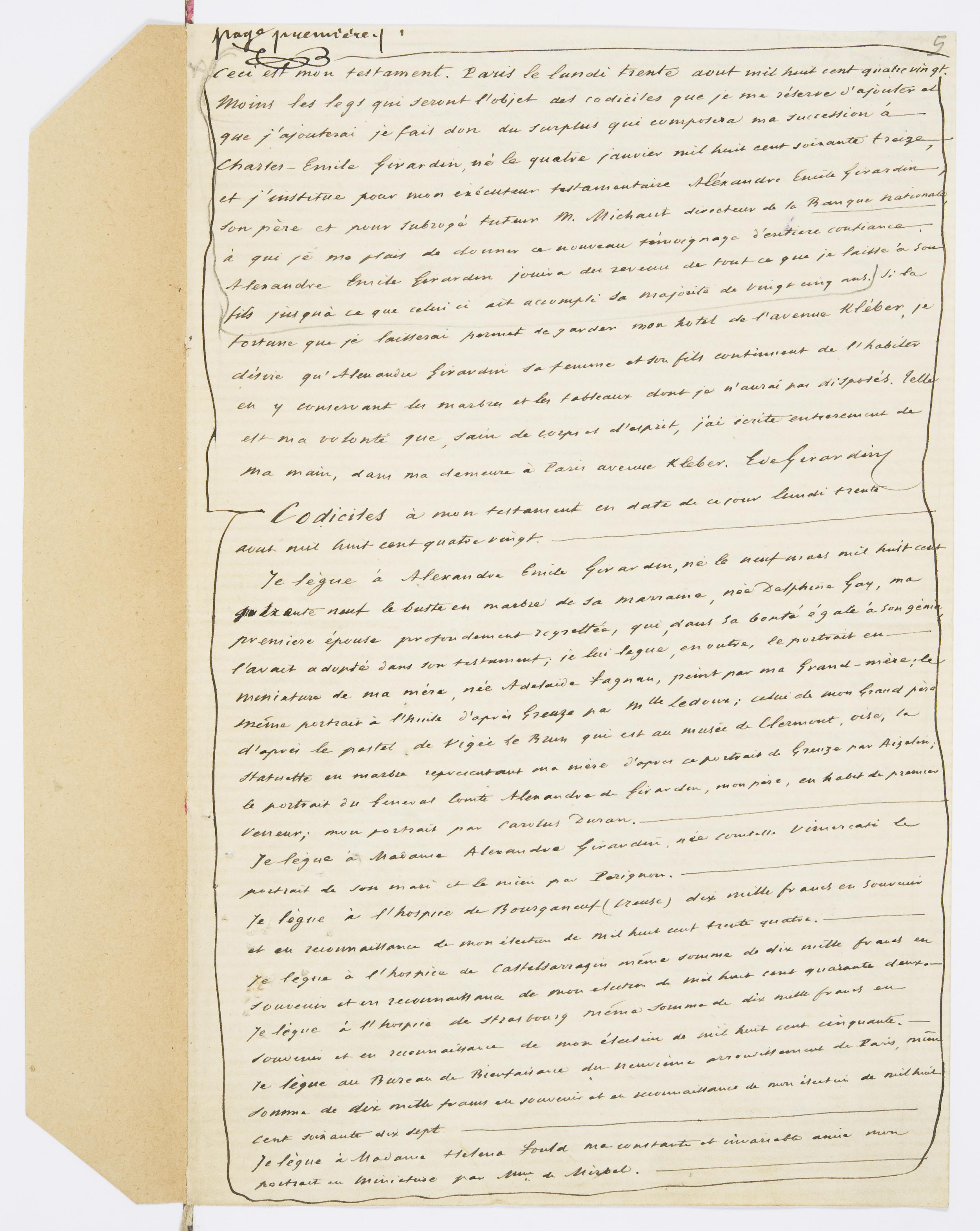 Testament olographe d’Emile de Girardin, première page